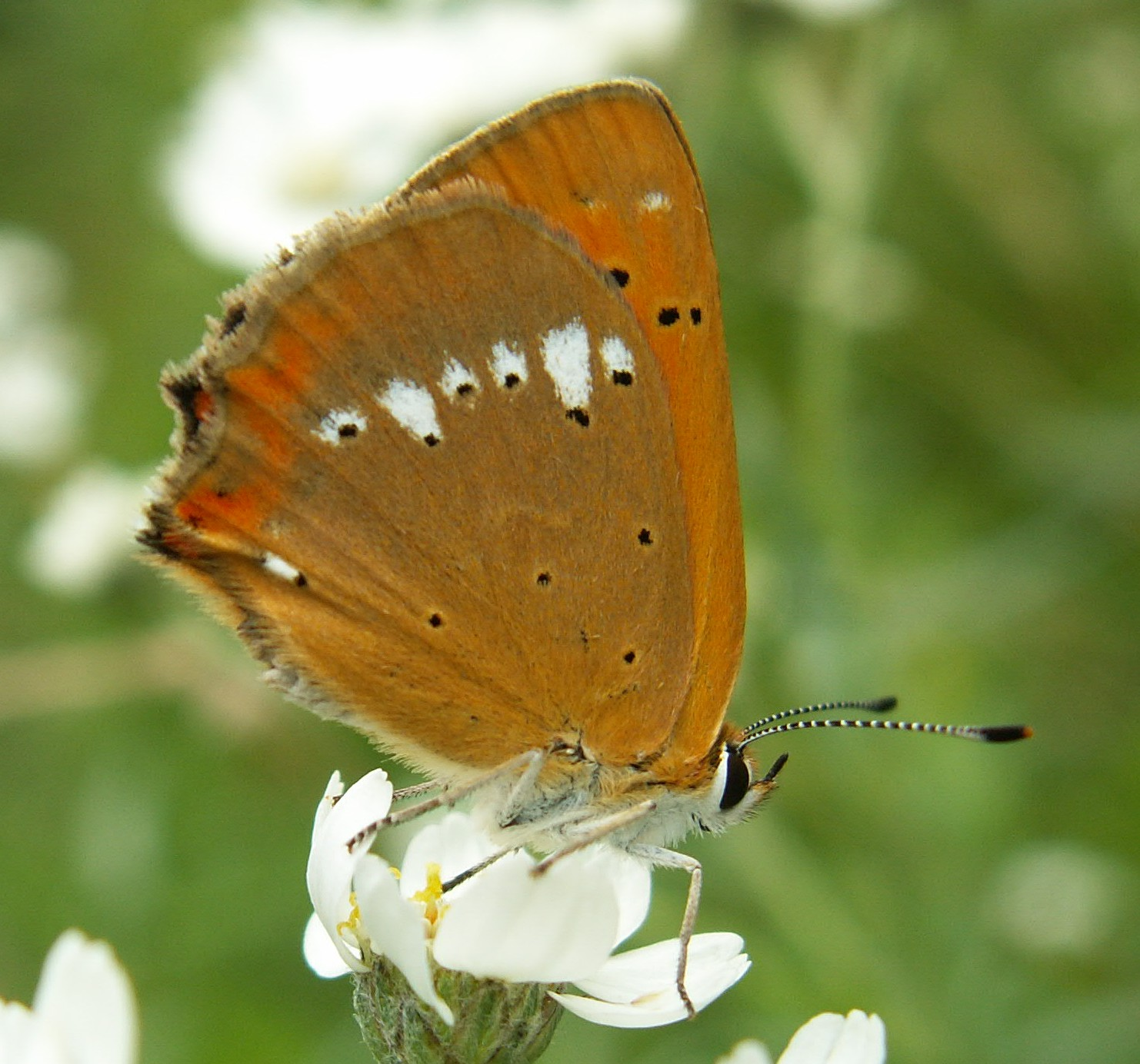 Lycaena virgaureae. Krępsko, Goleniów Commune, NW Poland